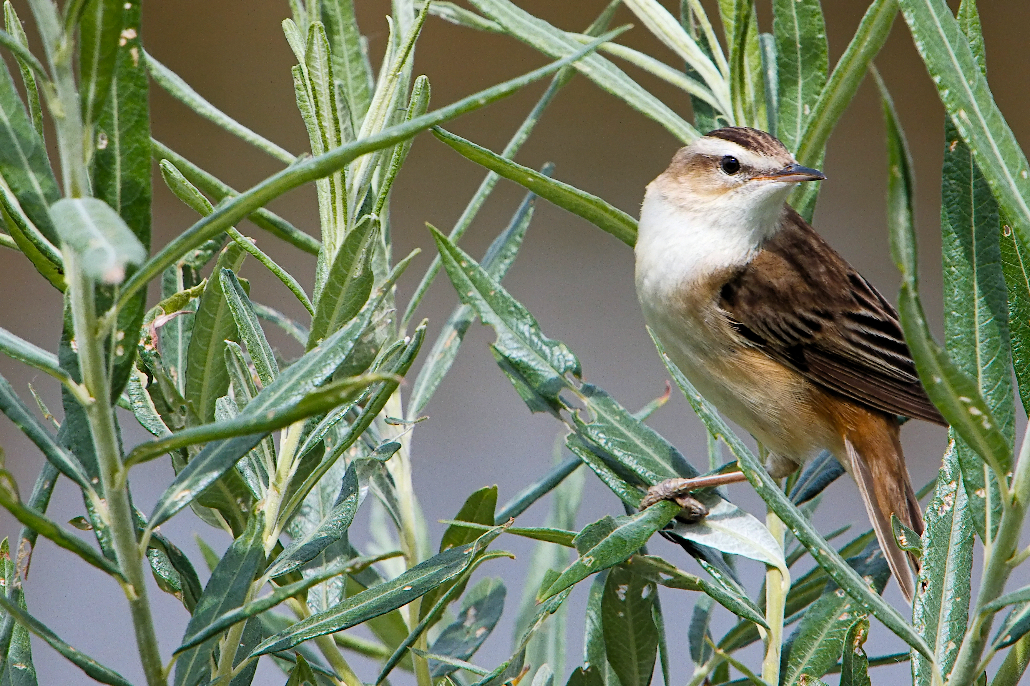 Sedge Warbler - Rutland Water